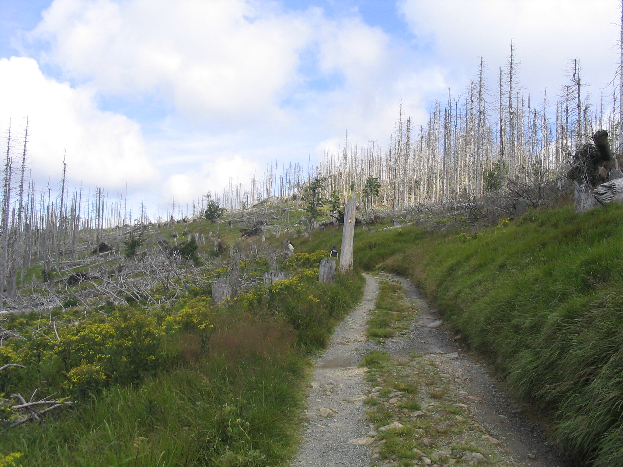 Abgestorbener Wald am Großen Rachel, Weg von Gfäll zum Waldschmidthaus Aufgenommen am 31.07.2007 von Dr. Hagen Graebner